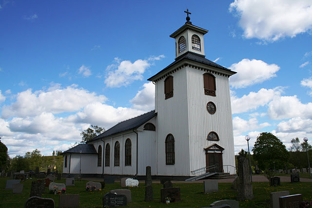 Mjöbäcks kyrka